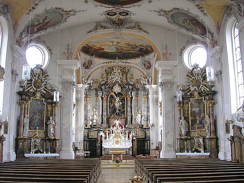 Pfarrkirche St. Michael (Denklingen, Landkreis Landsberg am Lech, Oberbayern). Innenansicht nach Osten. Eigene Aufnahme, Feb. 2007 / Parish church St. Michael (Denklingen near Landsberg am Lech, Bavaria, Germany). Interior, looking east. Own photo, Feb. 2007